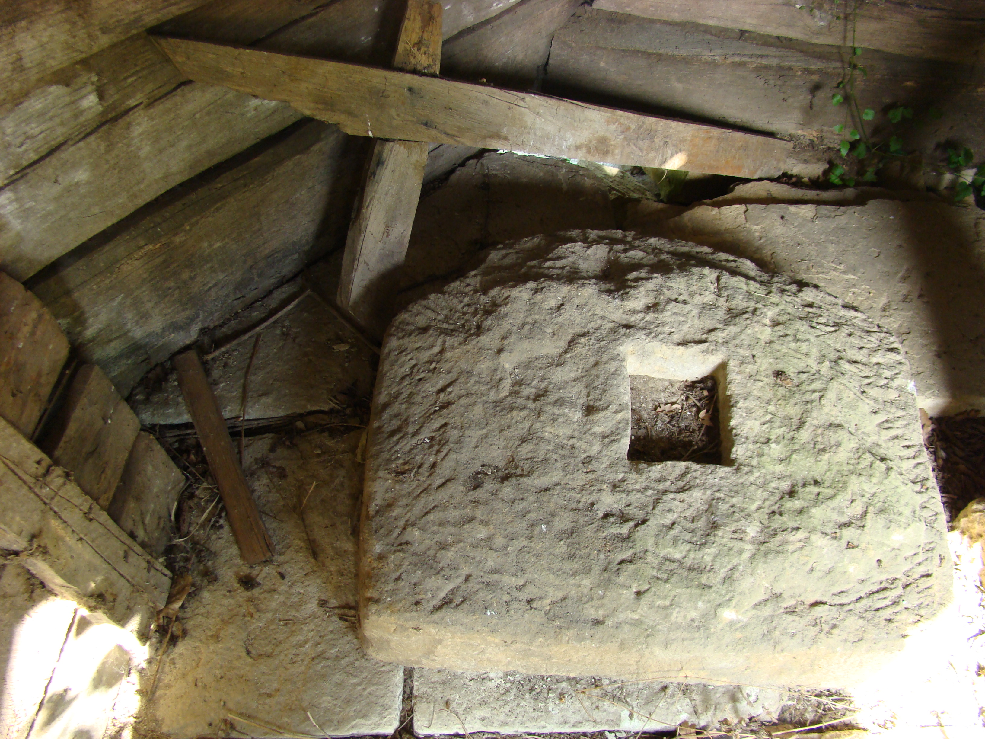 Absida bisericii de lemn "Sf. Arhangheli Mihail şi Gavril" , sat aparţinător CUFOAIA; oraş TÂRGU LĂPUŞ